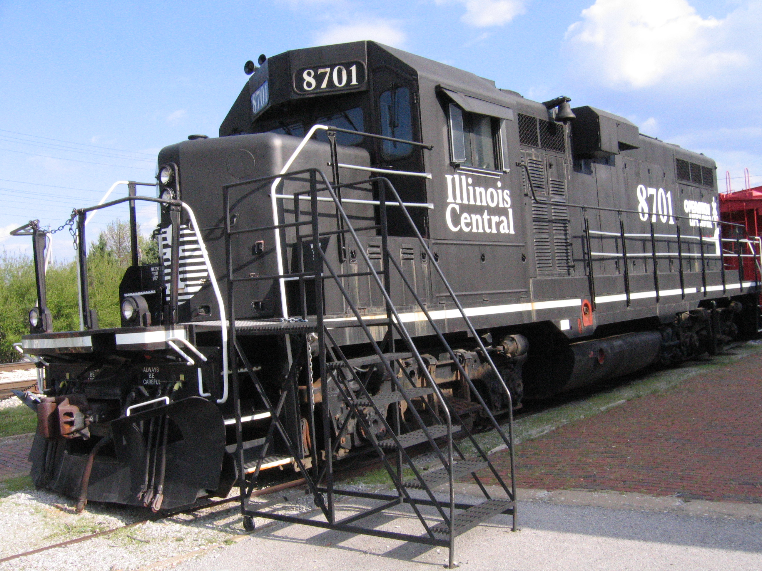 An Illinois Central Railroad diesel locomotive on static display in Carbondale, Illinois.